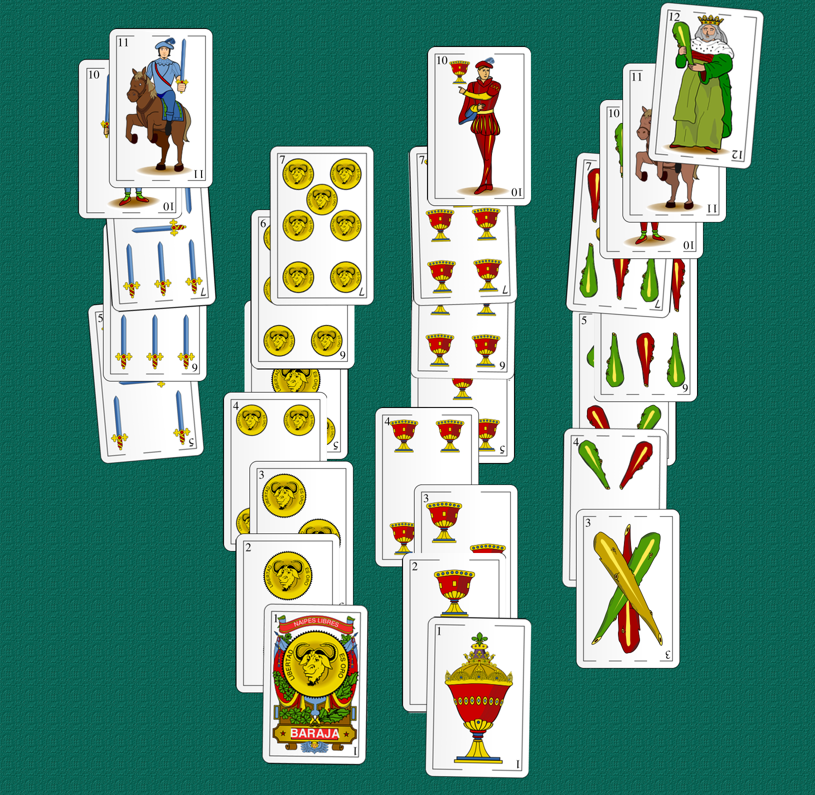 Juego del cinquillo. Durante el juego